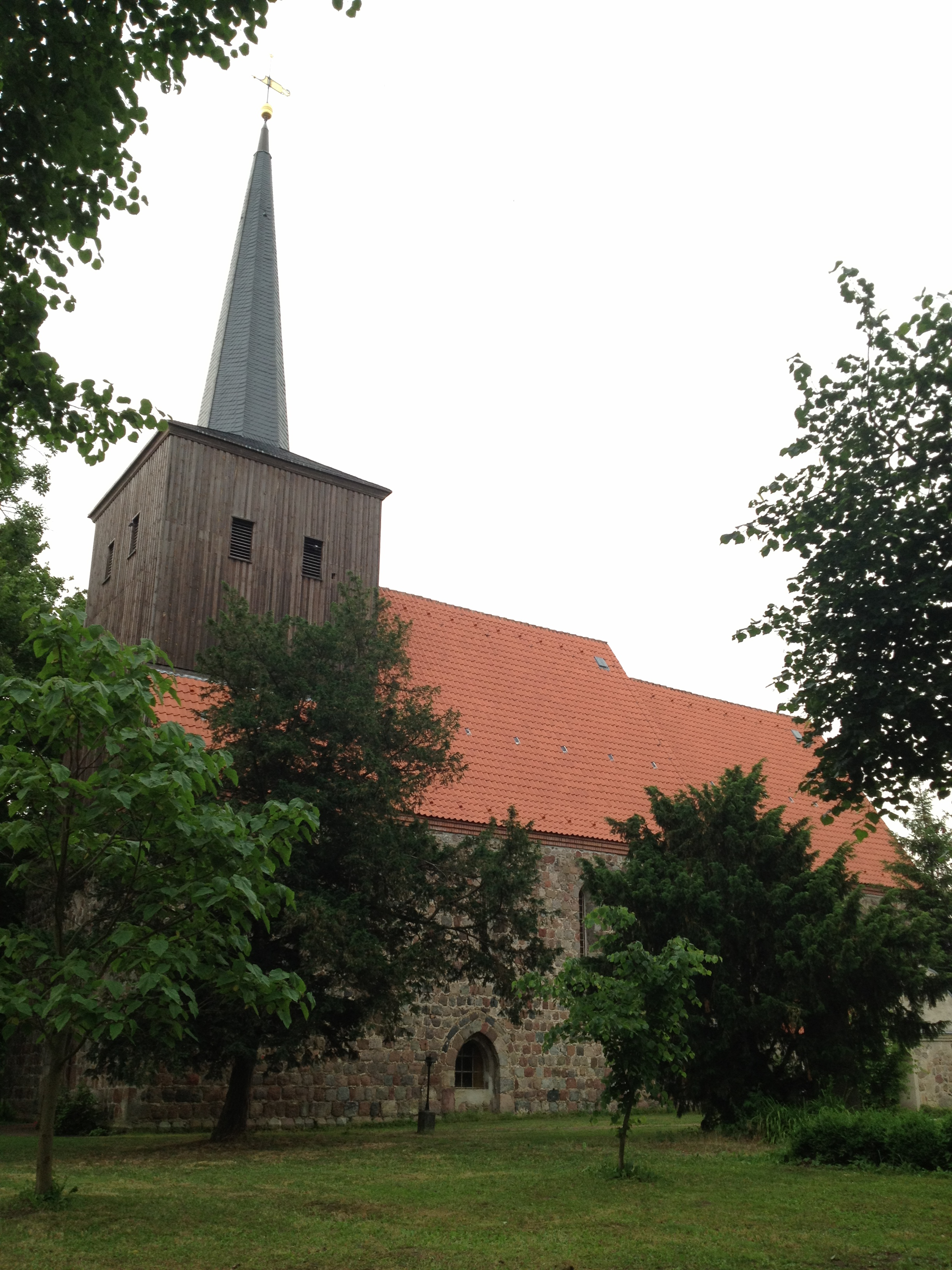 St. Johannes Kirche zu Hohenselchow Hohenselchow, Nebenstraße 17